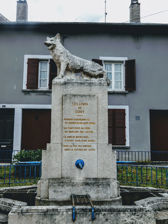 Le gentilé des habitants de Cirey sur Vezouze est Les loups. Le texte sur la fontaine explicite.